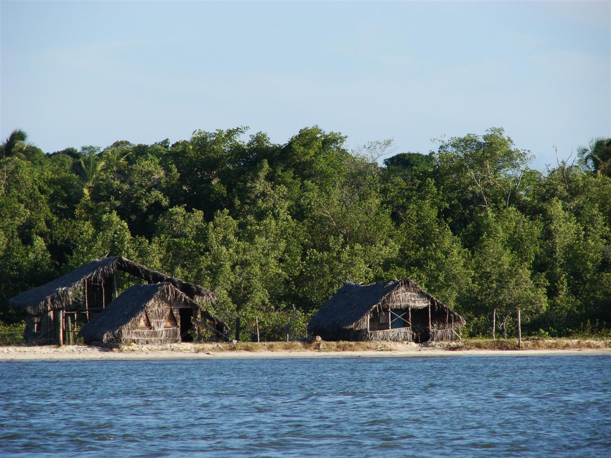 Mangue Seco, Jandaíra, Bahia, Brasil.